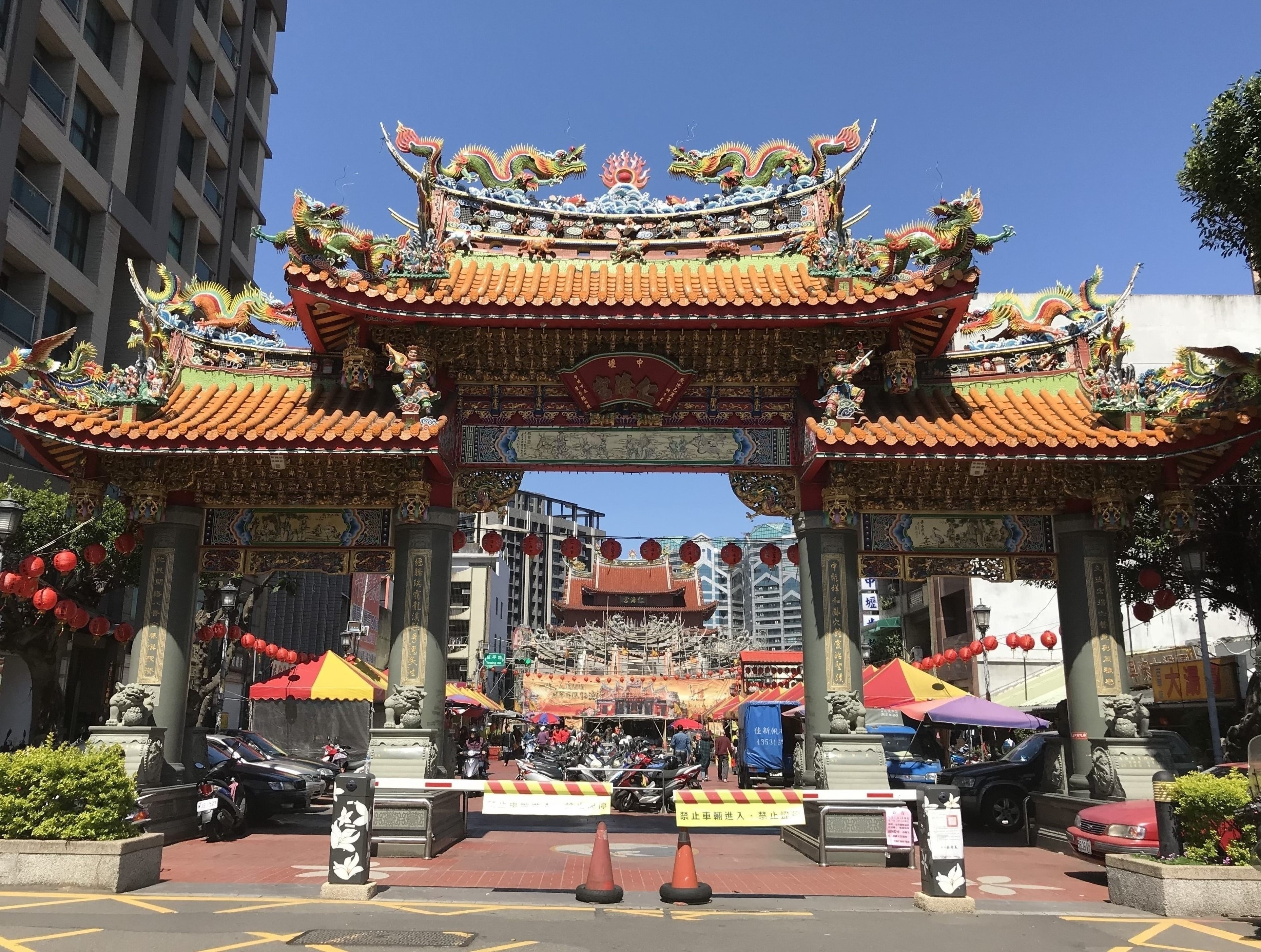 中壢仁海宮牌坊